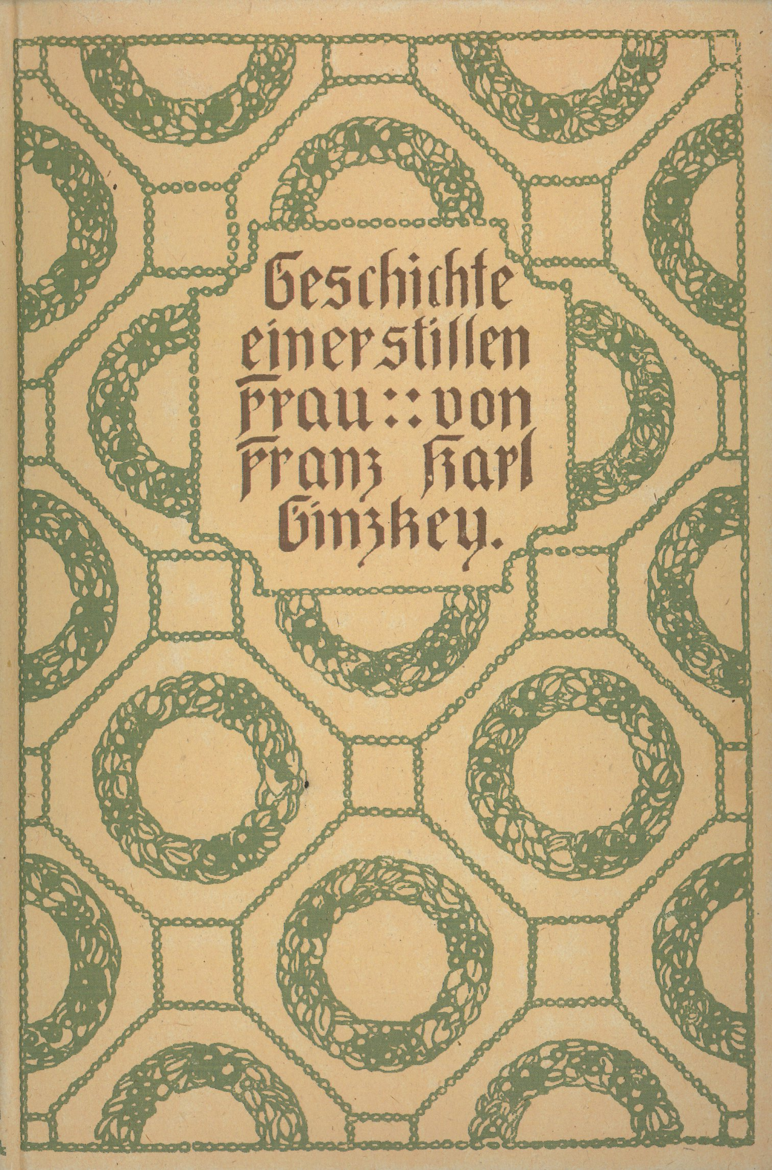 Franz Karl Ginzkey: Geschichte einer stillen Frau. L. Staackmann, Leipzig 1918 Buchgestaltung von Alfred Keller (1875-1945)